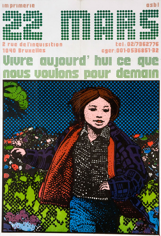 Une affiche de promotion éditée en 1980 pour l'imprimerie asbl 22-Mars, 2 rue de l'inquisition 1040 Bruxelles tel: 02/7362776.